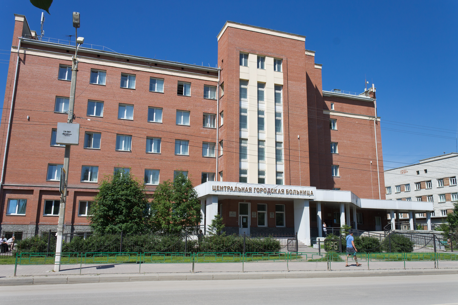 Центральная городская больница, улица Пушкина